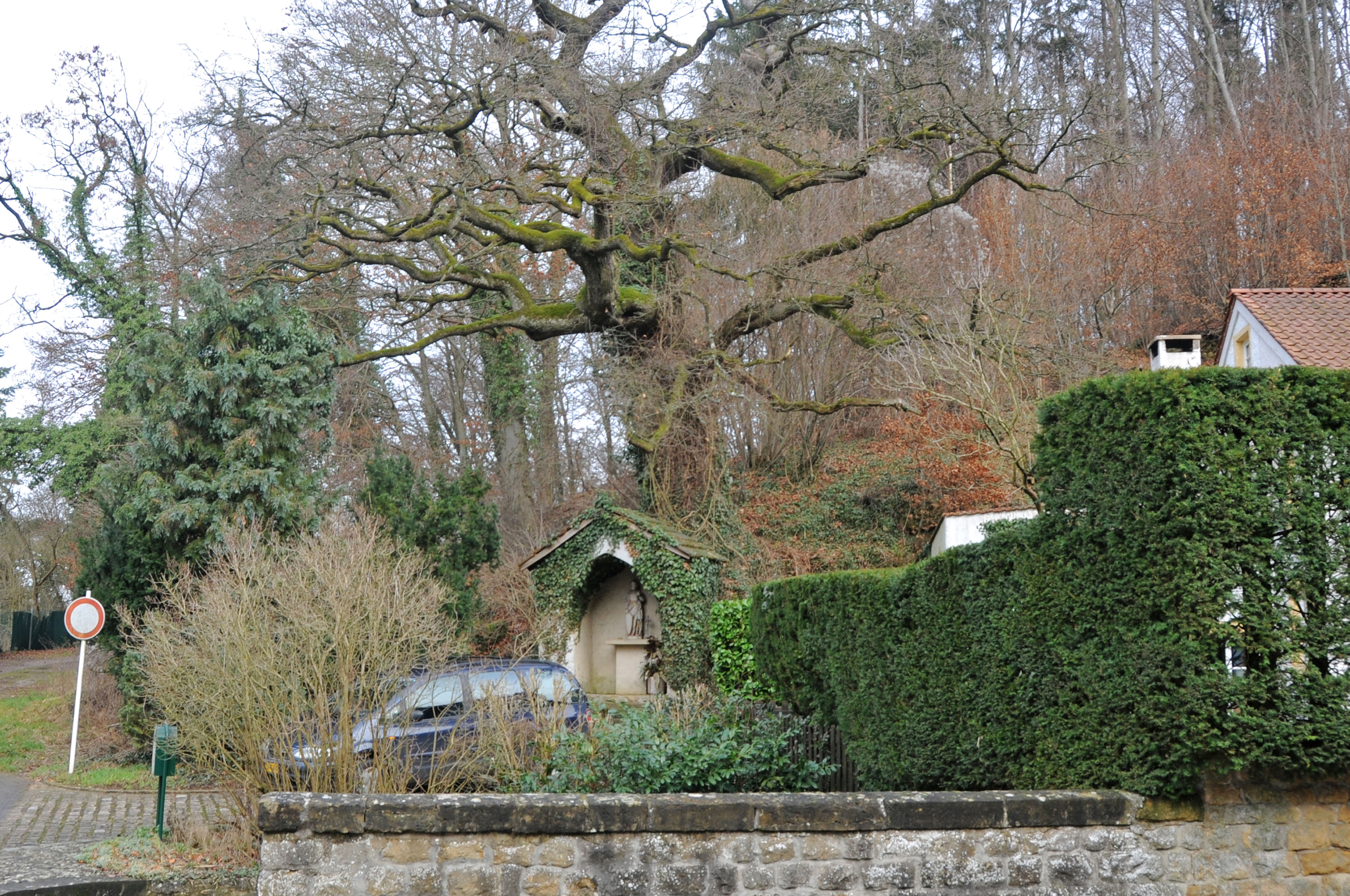 Eech zu Siren.